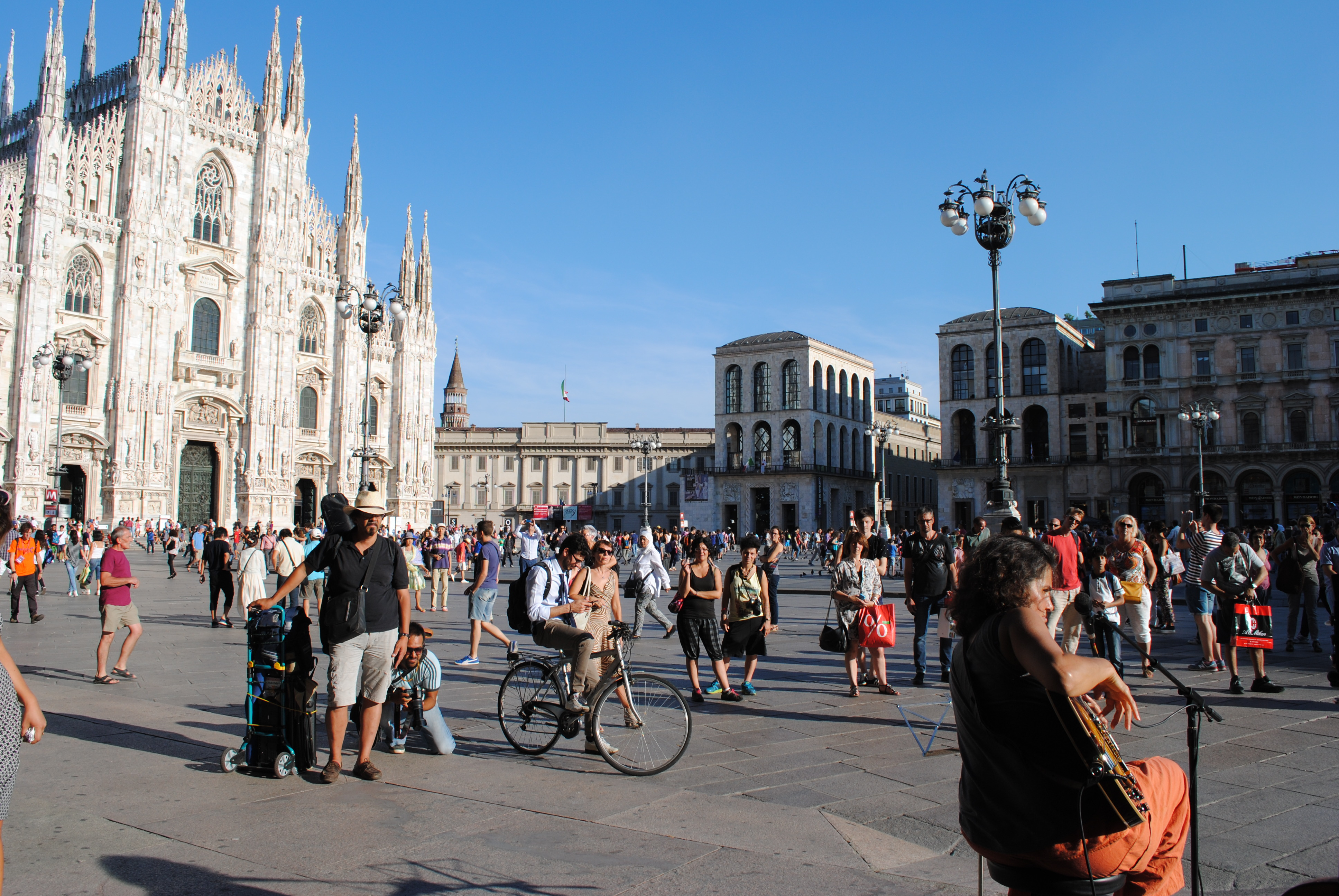 Marianne Aya Omac davanti al Duomo di Milano Ferrara Buskers Festival on Tour 2015 - Tappa di Milano